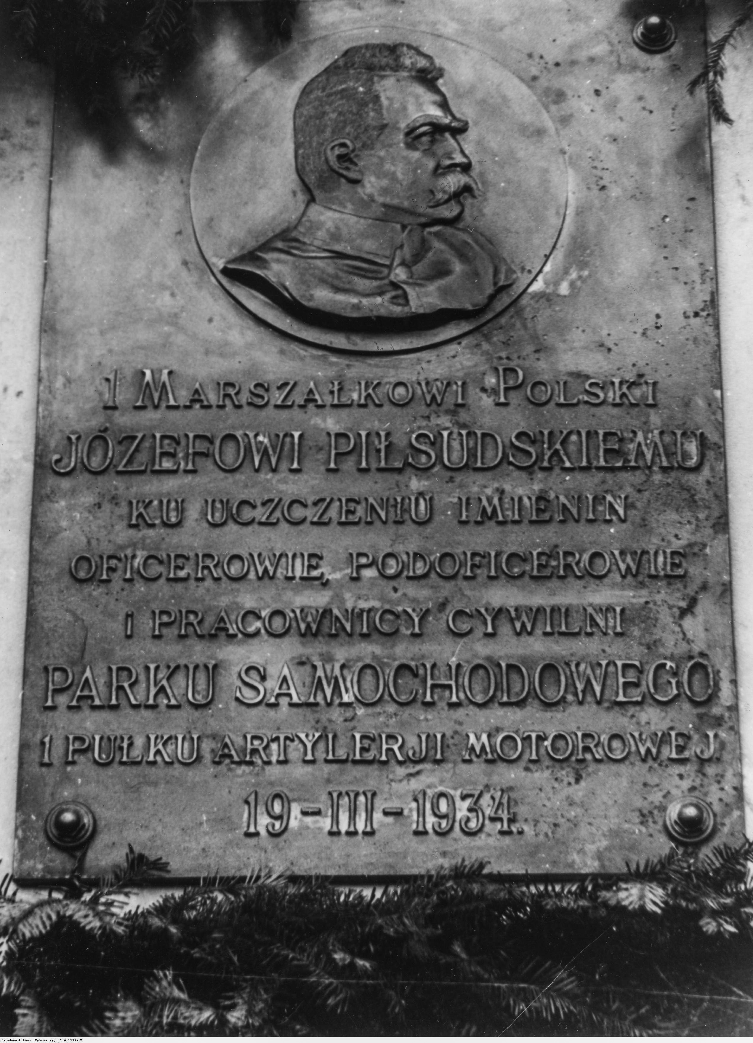 Tablica pamiątkowa ku czci Marszałka Józefa Piłsudskiego na ścianie budynku parku samochodowego 1 Pułku Artylerii Motorowej w Stryju. Koncern Ilustrowany Kurier Codzienny - Archiwum Ilustracji. Sygnatura: 1-W-1522a-2